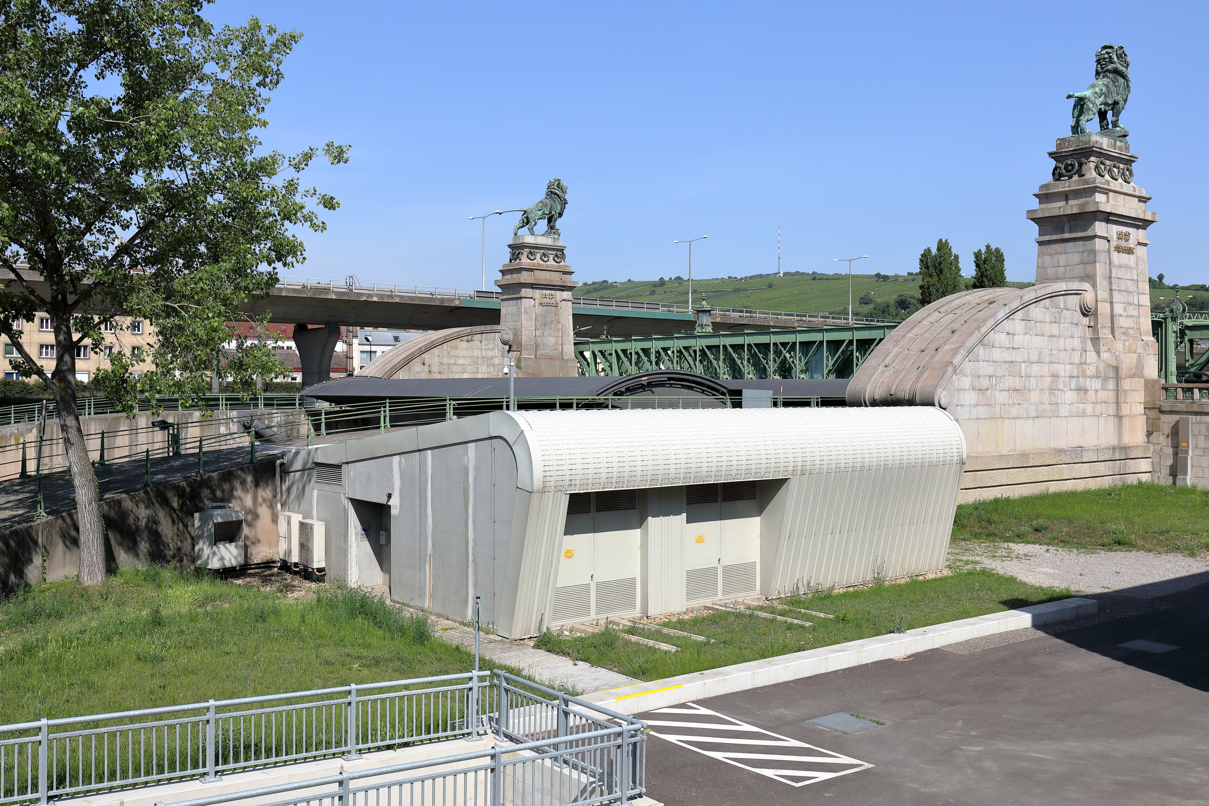 Das Gebäude des Kleinkraftwerkes bei der Nussdorfer Wehranlage im 20. Wiener Gemeindebezirk Brigittenau und links unten der Kanal der 2016/2017 errichteten Fischtreppe. 2004/2005 wurde ein Kleinkraftwerk mit 12 Matrix-Turbinen in die Wehr eingebaut und das dazugehörige Gebäude errichtet. Die Wehranlage wurde von Otto Wagner entworfen und von 1894 bis 1898 errichtet. Sie besteht aus der eigentlichen Wehr, die mehrfach umgebaut wurde, der Schemerlbrücke, dem ehemaligen Verwaltungsgebäude für die „Donau-Regulierungs-Commission“ und dem sogenannten „Kettenmagazin-Gebäude“.